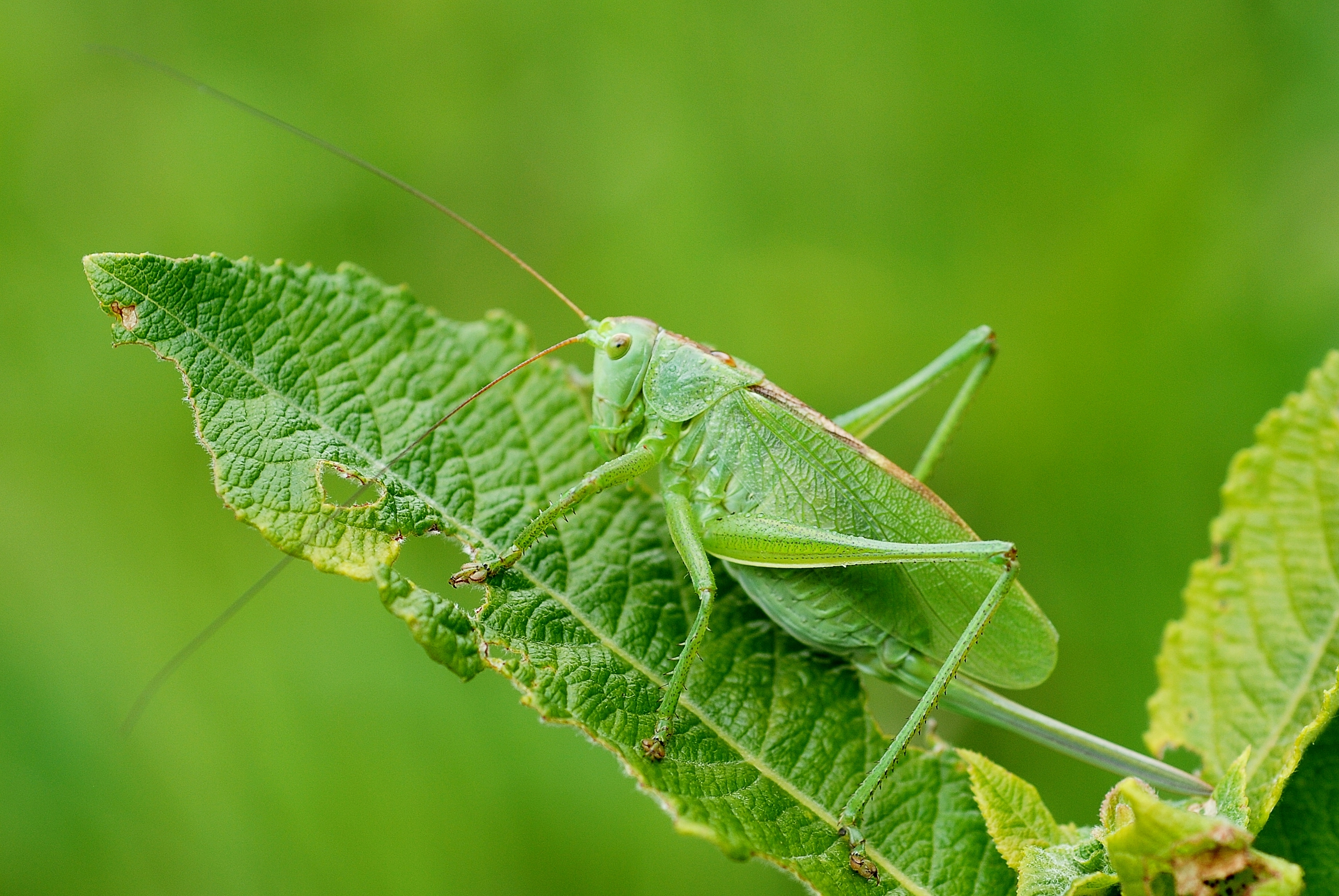 Tettigonia cantans female